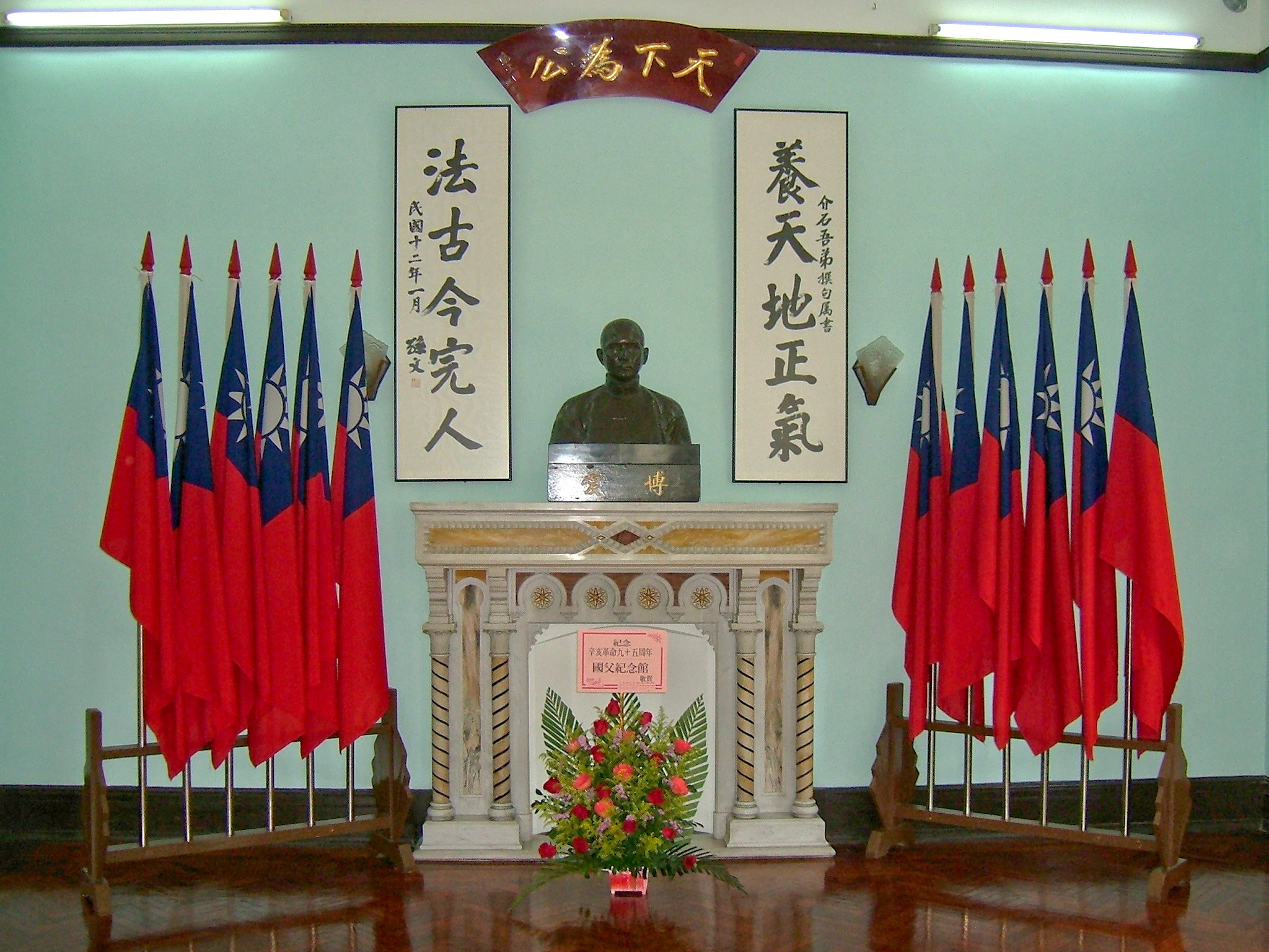 澳門國父紀念館